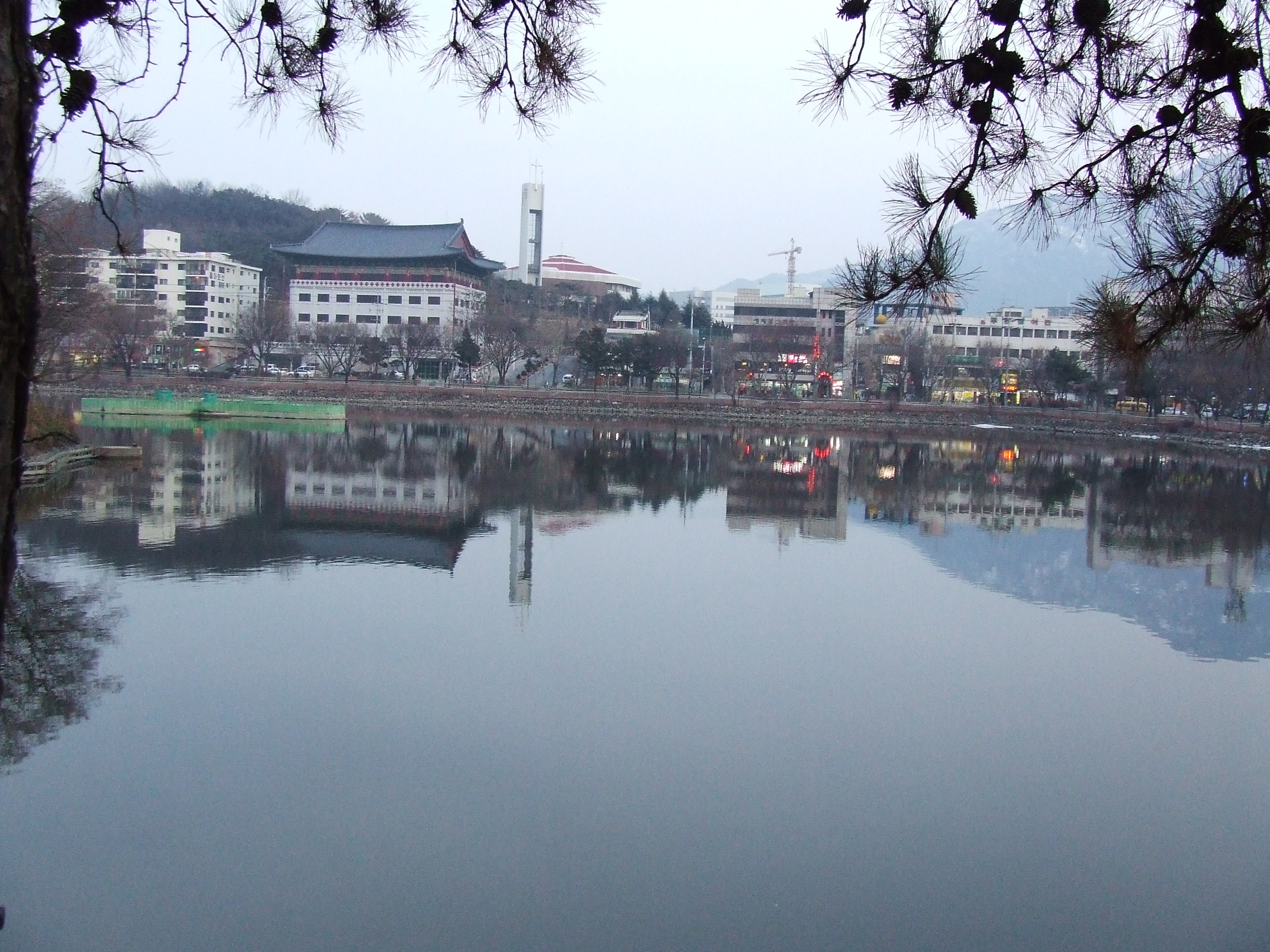 대한민국 대구광역시 두류공원에 위치한 성당못